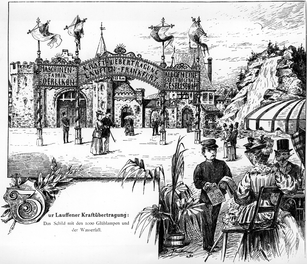 25. August 1891. Der elektrifizierte Arkadenbogen Internationalen Elektrotechnischen Ausstellung in Frankfurt am Main, bestückt mit 1000 Glühbirnen, deren Energie über eine 175 km lange Überlandleitung aus Lauffen am Neckar übertragen wurde. Daneben der künstliche Wasserfall. Zeitgenössische Lithographie.